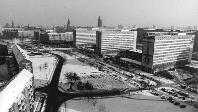 Dresden, Neubauten, Winter ADN-ZB Häßler 10.2.87 Dresden: Wohnungsbau - Große städtebauliche Veränderungen vollzogen sich in den vergangenen Jahrzehnten in Dresden nach der Zerstörung vor 42 Jahren. Seit 1986 wohnen 221.000 Bürger, das sind rund 43 Prozent, in einer neugebauten oder modernisierten Wohnung. Bis 1990 werden im Stadtzentrum weitere 3 111 Wohnungseinheiten entstehen. -Blick auf das Stadtzentrum - - siehe auch 1987-0210-1N - Information added by Wikimedia users.